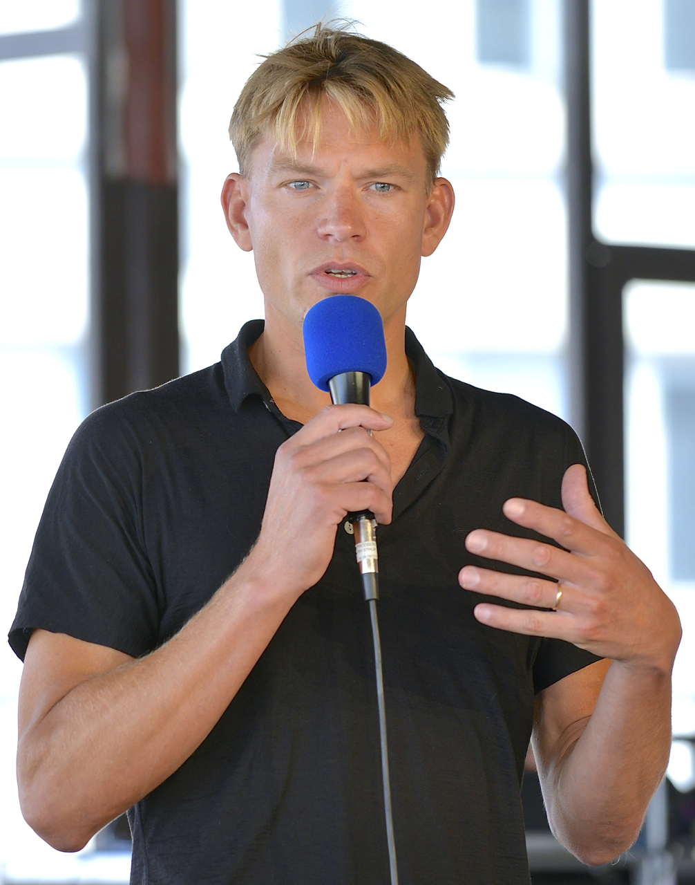 PM Nilsson i P1 Ekots Valspecial kommenterar frågorna inför valet. Plats: Kulturhuset Stadsteatern den 13 september 2014.